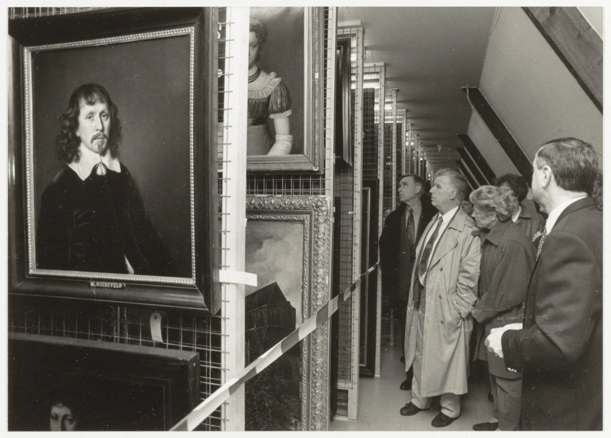 CollectieCollectie Fotoburo de BoerInventarisnummerNL-HlmNHA_54035160NL-HlmNHA_1478_39560KBeschrijvingNationaal museumweekend. In het Frans Halsmuseum krijgen bezoekers gelegenheid een blik in het depot te werpen.FotonummerNL-HlmNHA_1478_3199DocumenttypeTopografische prenten, tekeningen en foto'sVervaardigerStapel, Babette (UP de Boer) Soort vervaardigerFotograaf Interieur/ExterieurinterieurAnnotatiesHD180494LandNederland ProvincieNoord-Holland GemeenteHaarlem PlaatsHaarlem StraatGroot Heiligland GeografischCentrum Datering gebeurtenis18-04-1994TechniekFoto Trefwoordenmusea